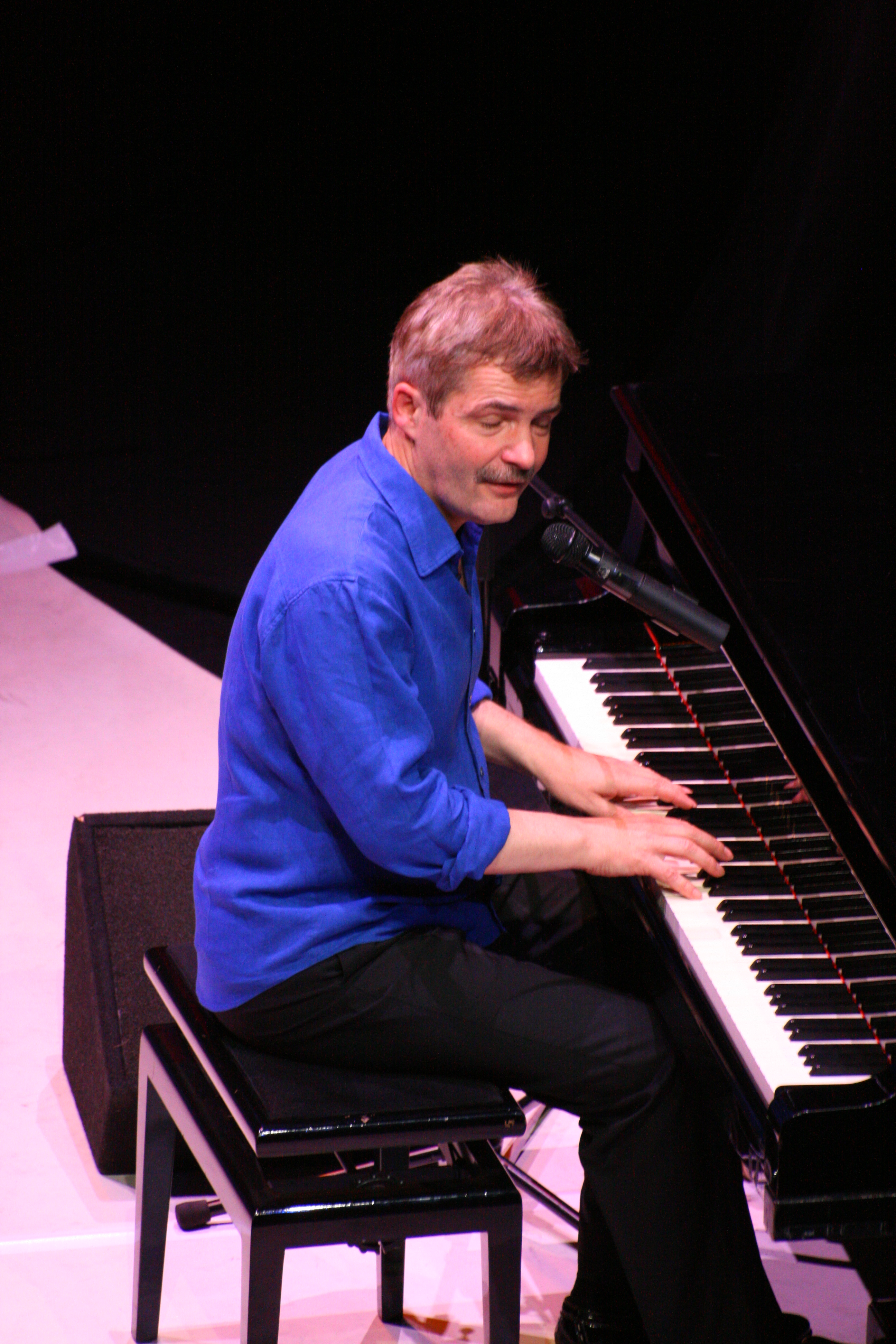 Herman Finkers tijdens zijn show 'Na de Pauze'